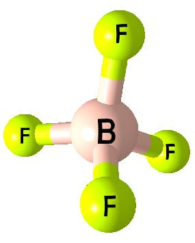 Tetrafluoridoboritanový anion - [BF4]